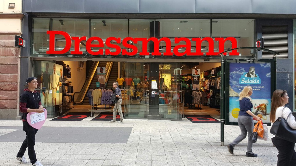 Flagship-butik i centrala Stockholm.